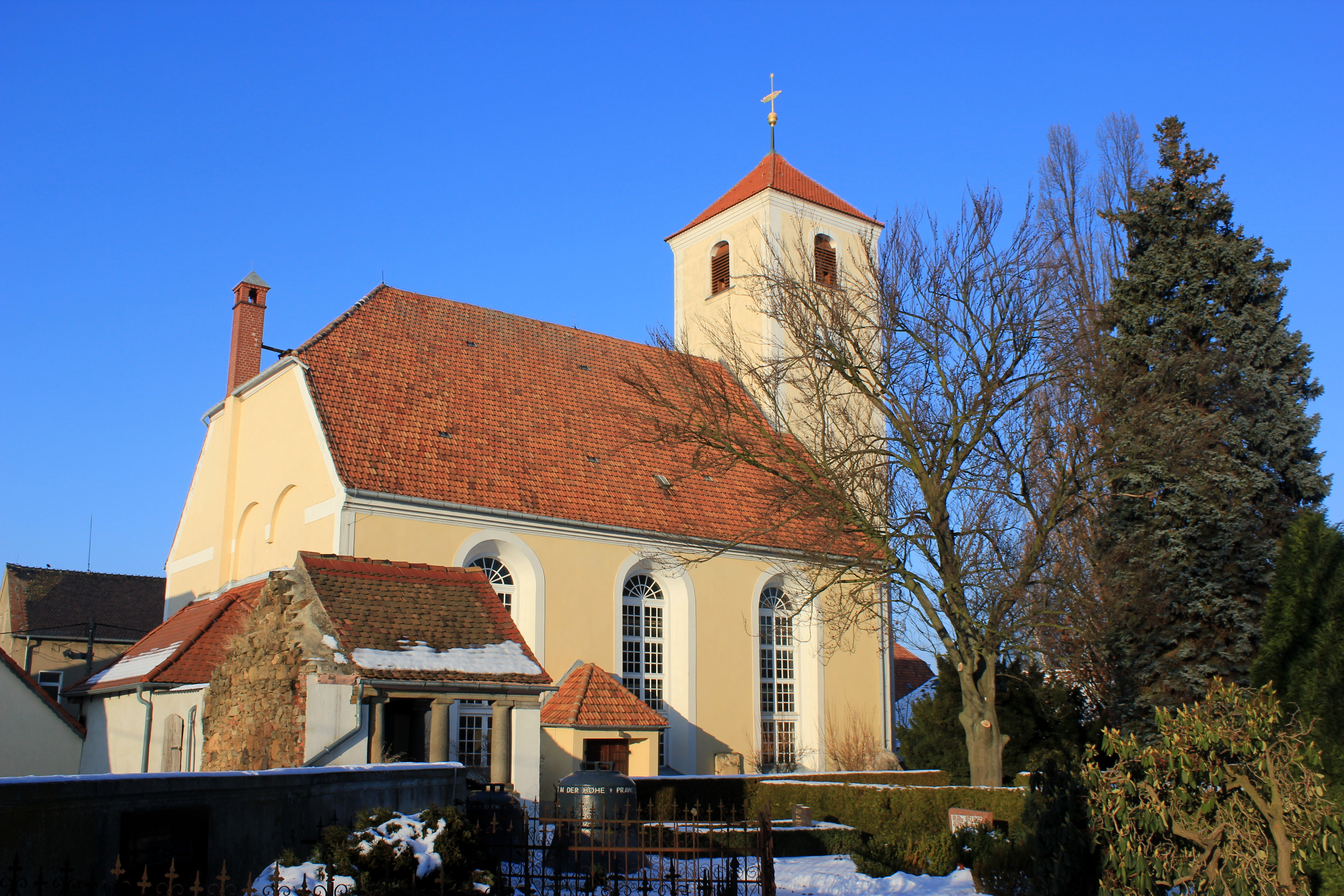 Hornjoserbsce: Ewangelska cyrkej w Poršicach.